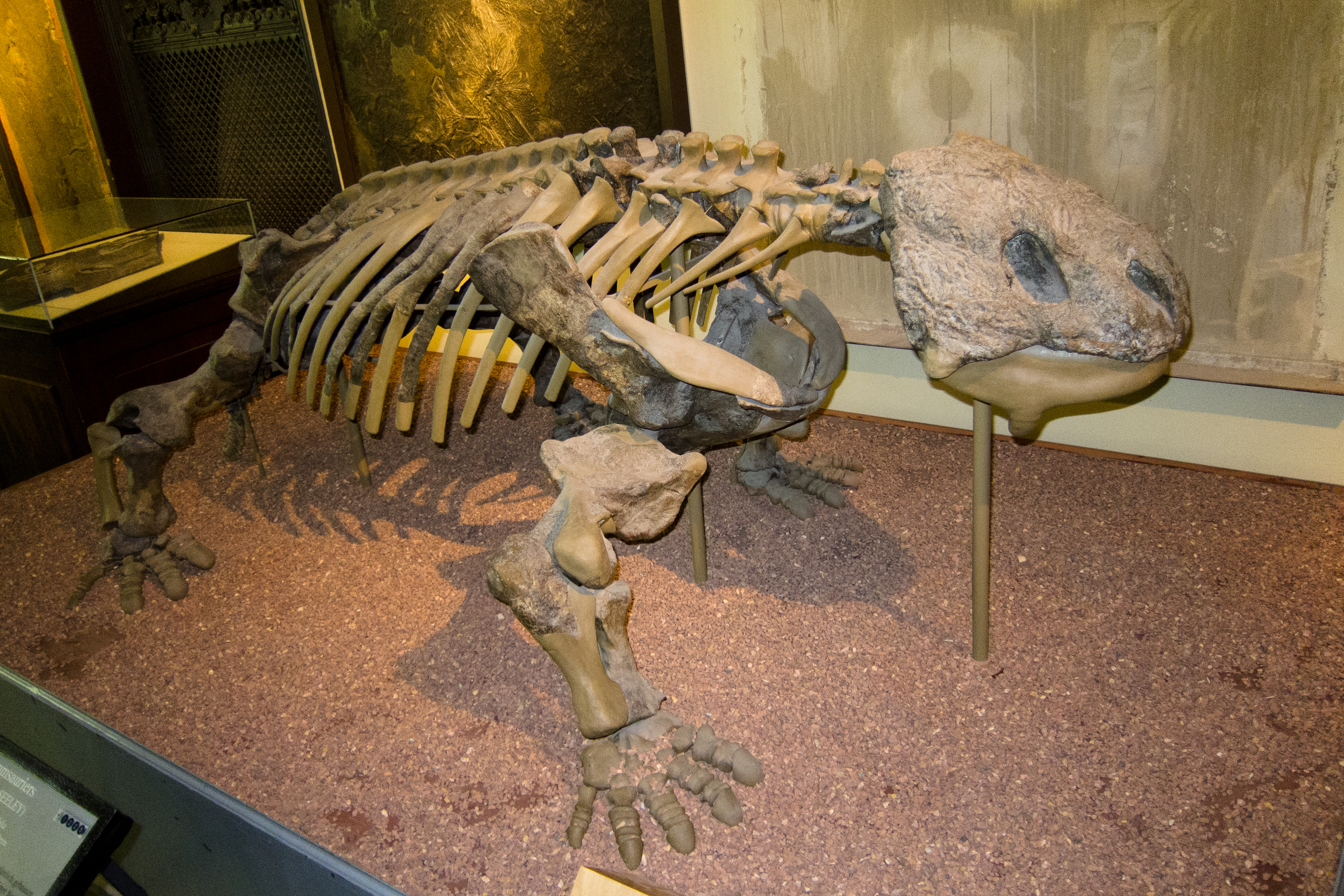 Berlin 2012